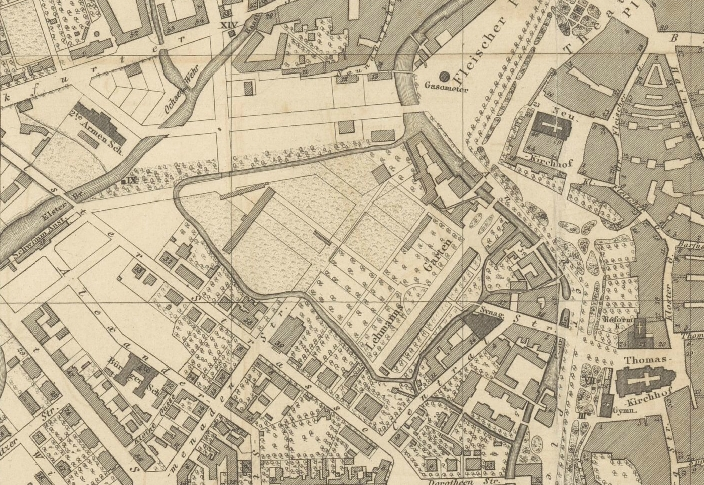 Der Diebesgraben auf einem Leipziger Stadtplanausschnitt westlich der Innenstadt von 1864